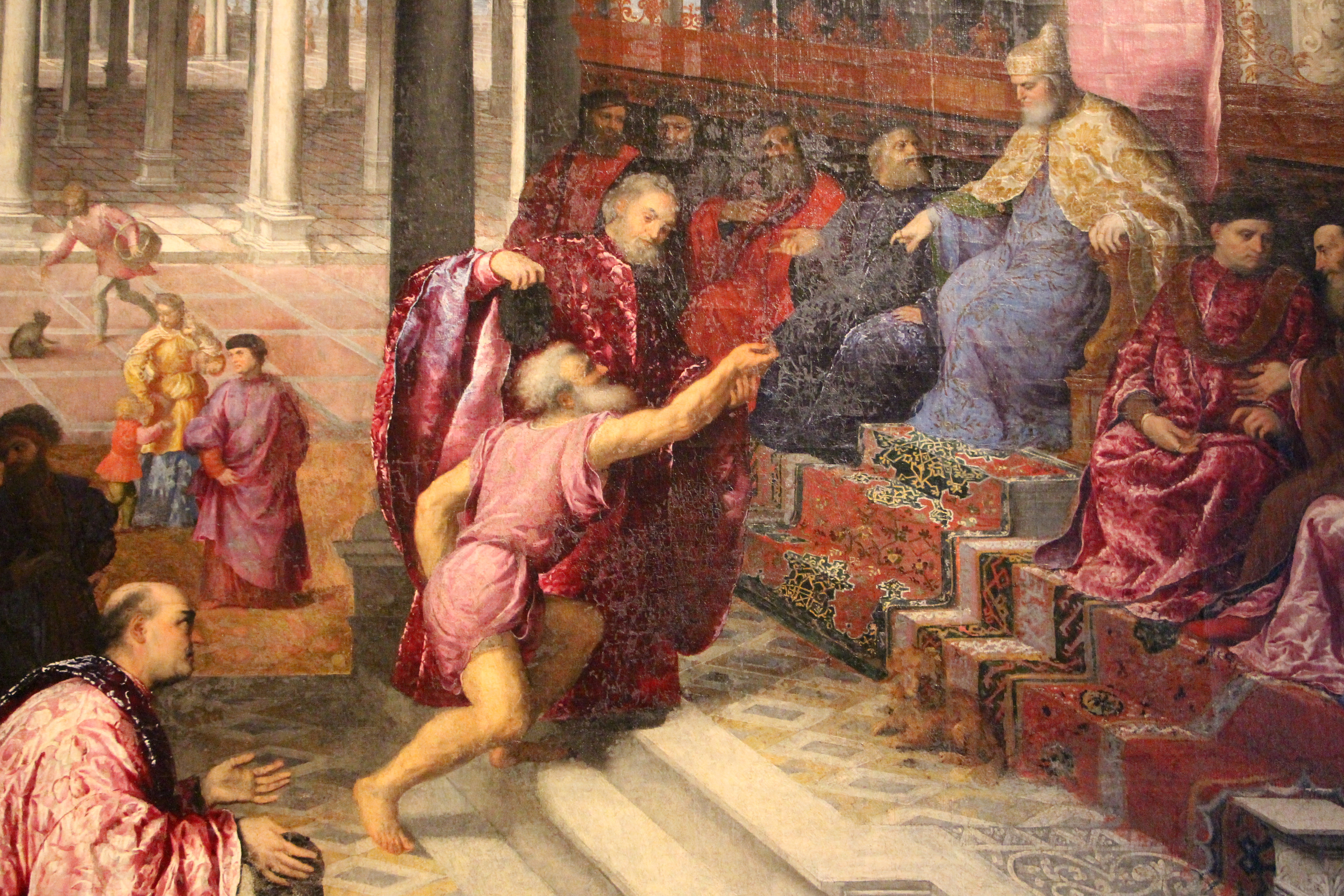 Gallerie dell'Accademia - MIBAC The making of this document was supported by Wikimedia CH. (Submit your project!) For all the files concerned, please see the category Supported by Wikimedia CH. This is a photo of a monument which is part of cultural heritage of Italy.